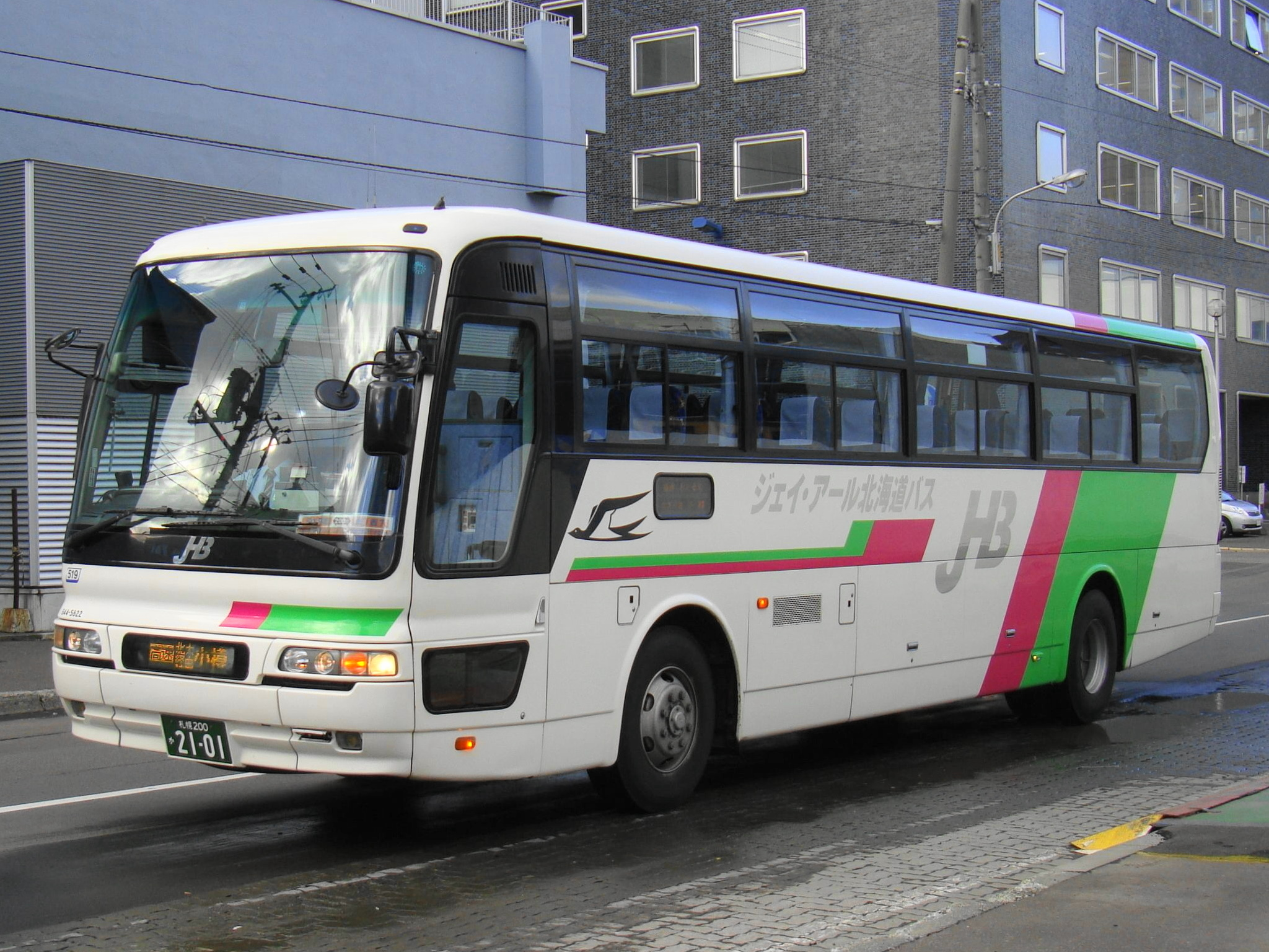 "Kōsoku Otaru gō" Sapporo to Otaru